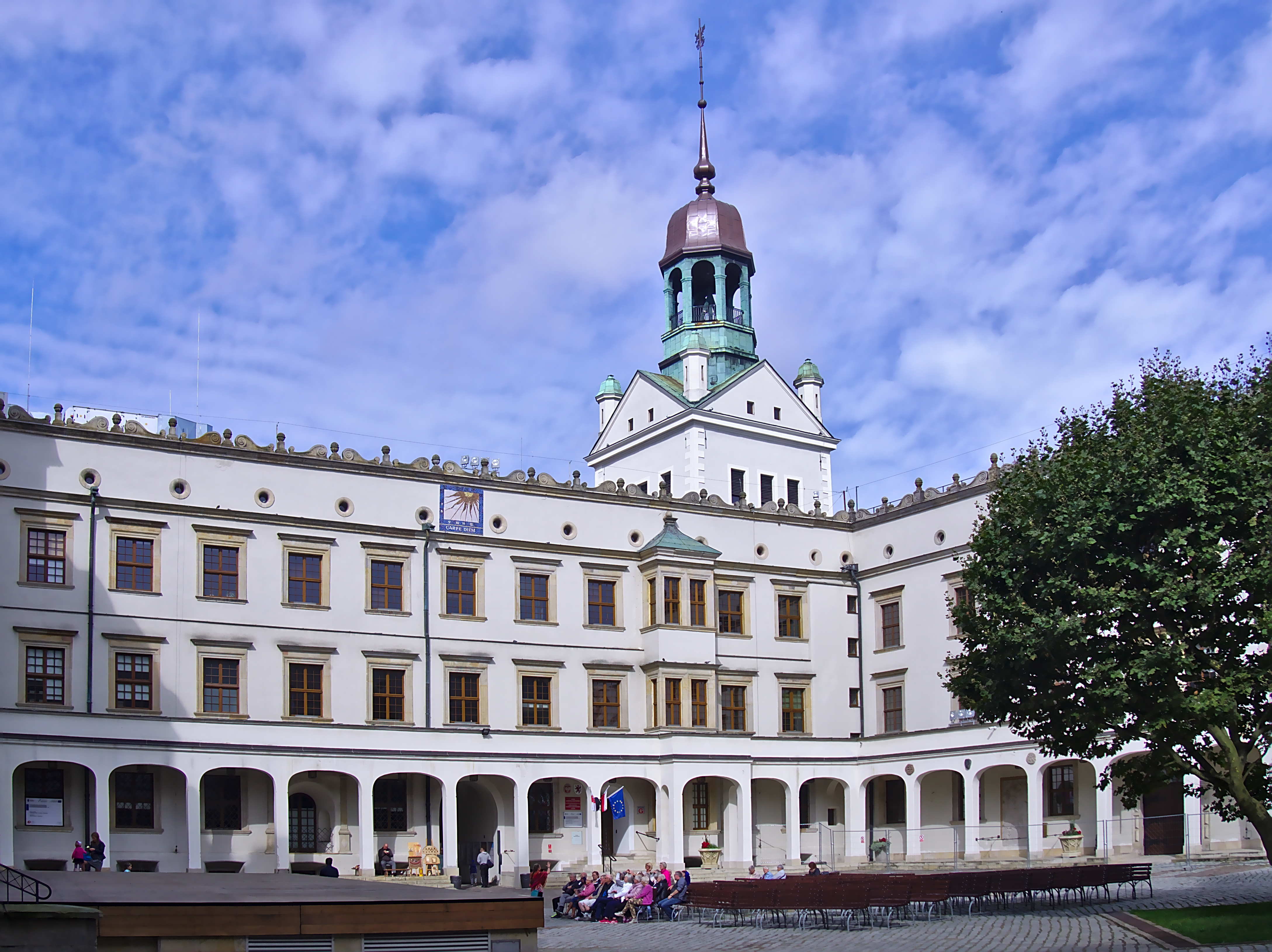 Szczecin, Zamek książąt pomorskich Wikidata has entry Q33304445 with data related to this item.